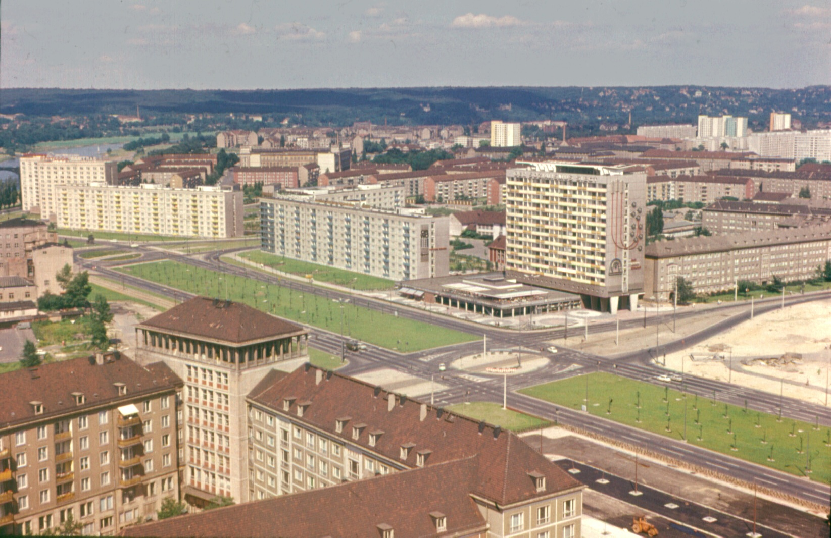 Dresden 1972, Blick vom Rathausturm zum Pirnaischen Platz